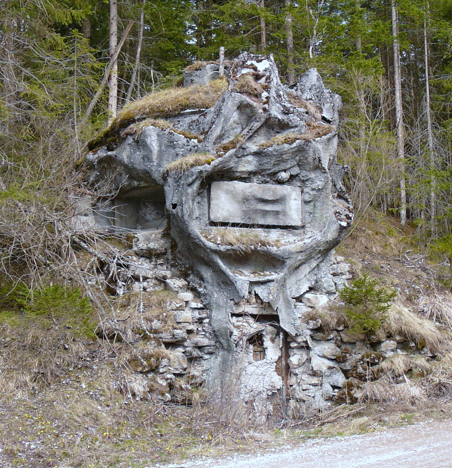 Opera 2, sbarramento Dobbiaco